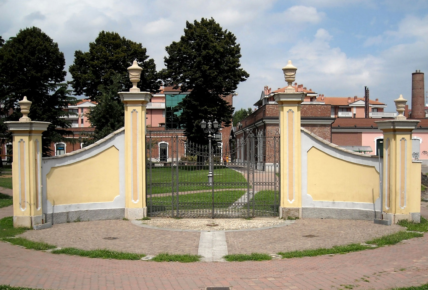 Il vecchio portale del parco di Villa Taroni ad Arluno